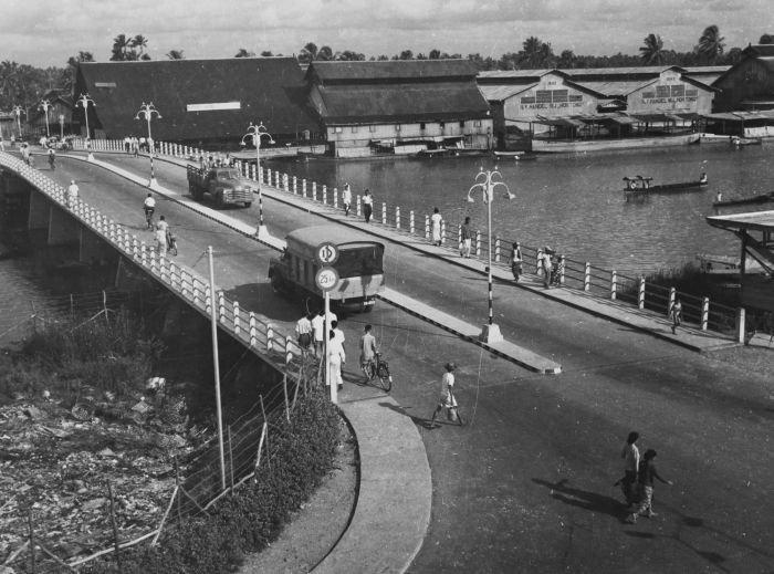 foto. Vrachtwagens passeren een nieuwe brug over de Martapura rivier te Bandjermasin op Zuid-Borneo